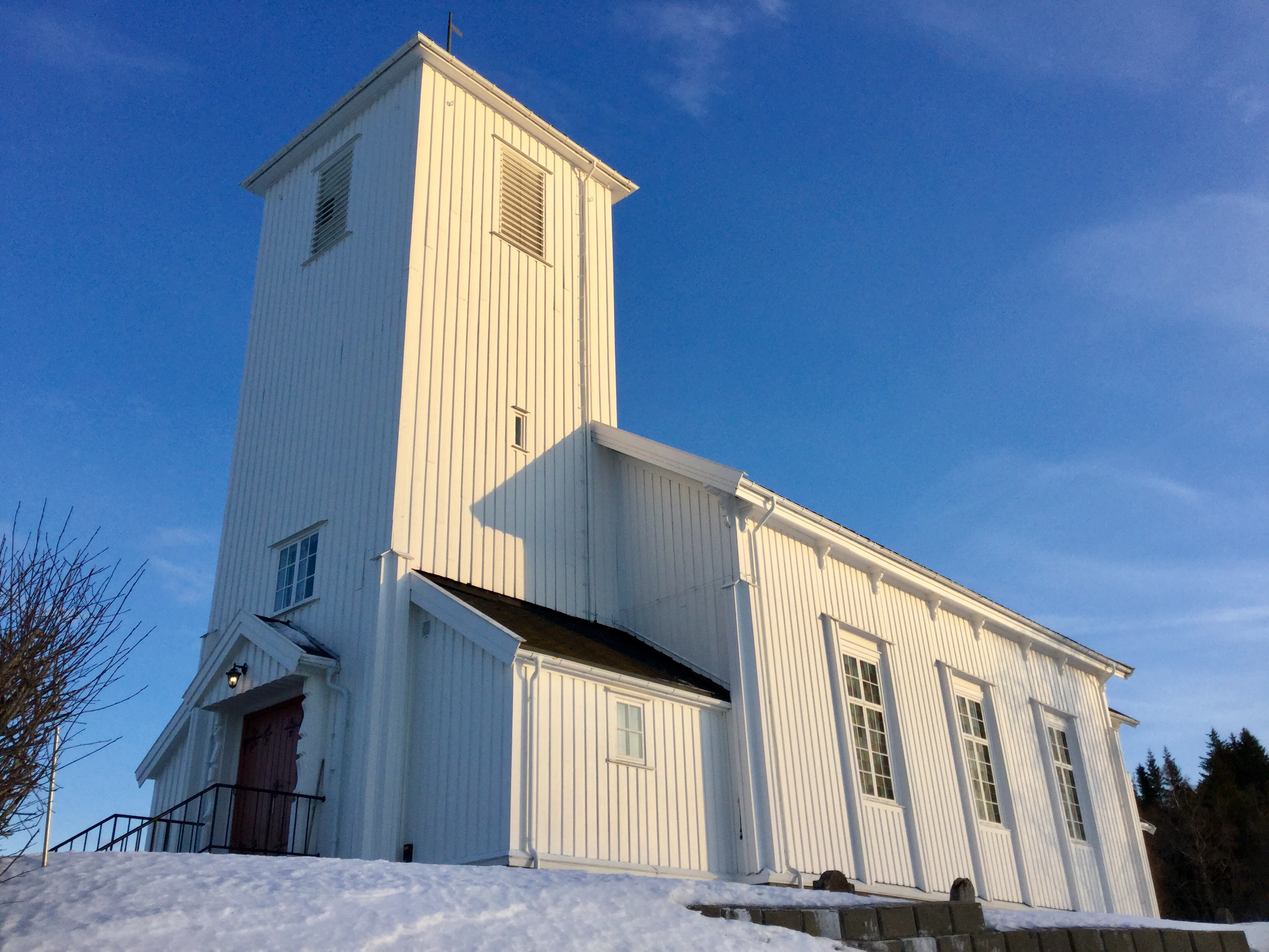 Klinga kirke i Namsos kommune, Trøndelag